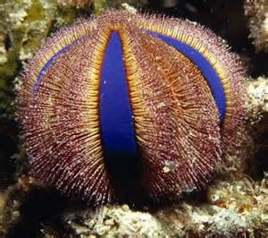 Oursin smoking (Mespilia globulus).